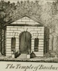 Detail Ilustrace z knihy Stowe : a description of the house and gardens of the most noble and puissant prince, George Grenville Nugent Temple, Marquis of Buckingham, Earl Temple, Viscount and Baron Cobham .. (1788)